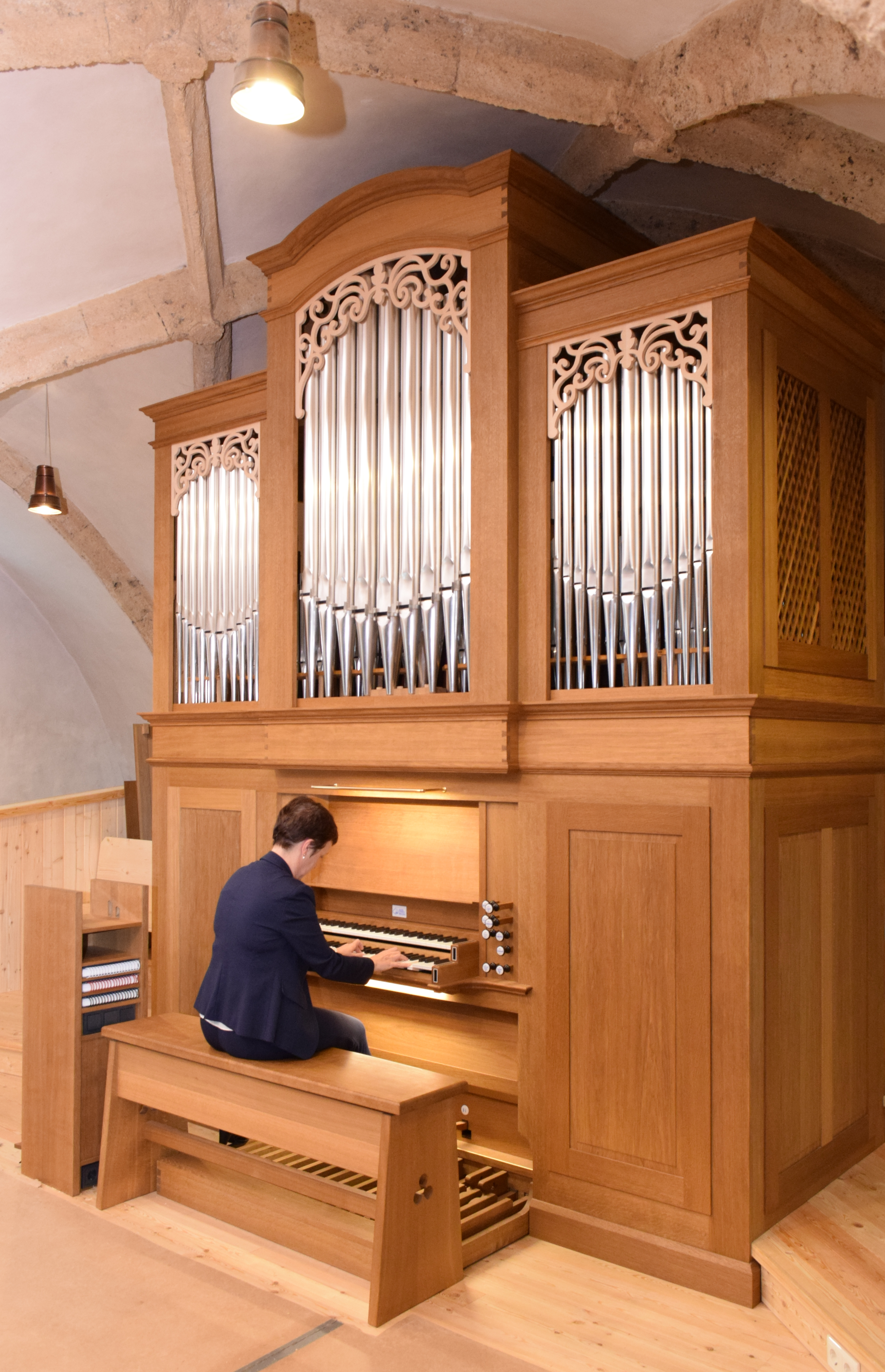 Alois Linder Orgel in der Faistenau, Orgelbau betreut durch die Orgelsachverständige Michaela Aigner, eingeweiht am 25. Juli 2018